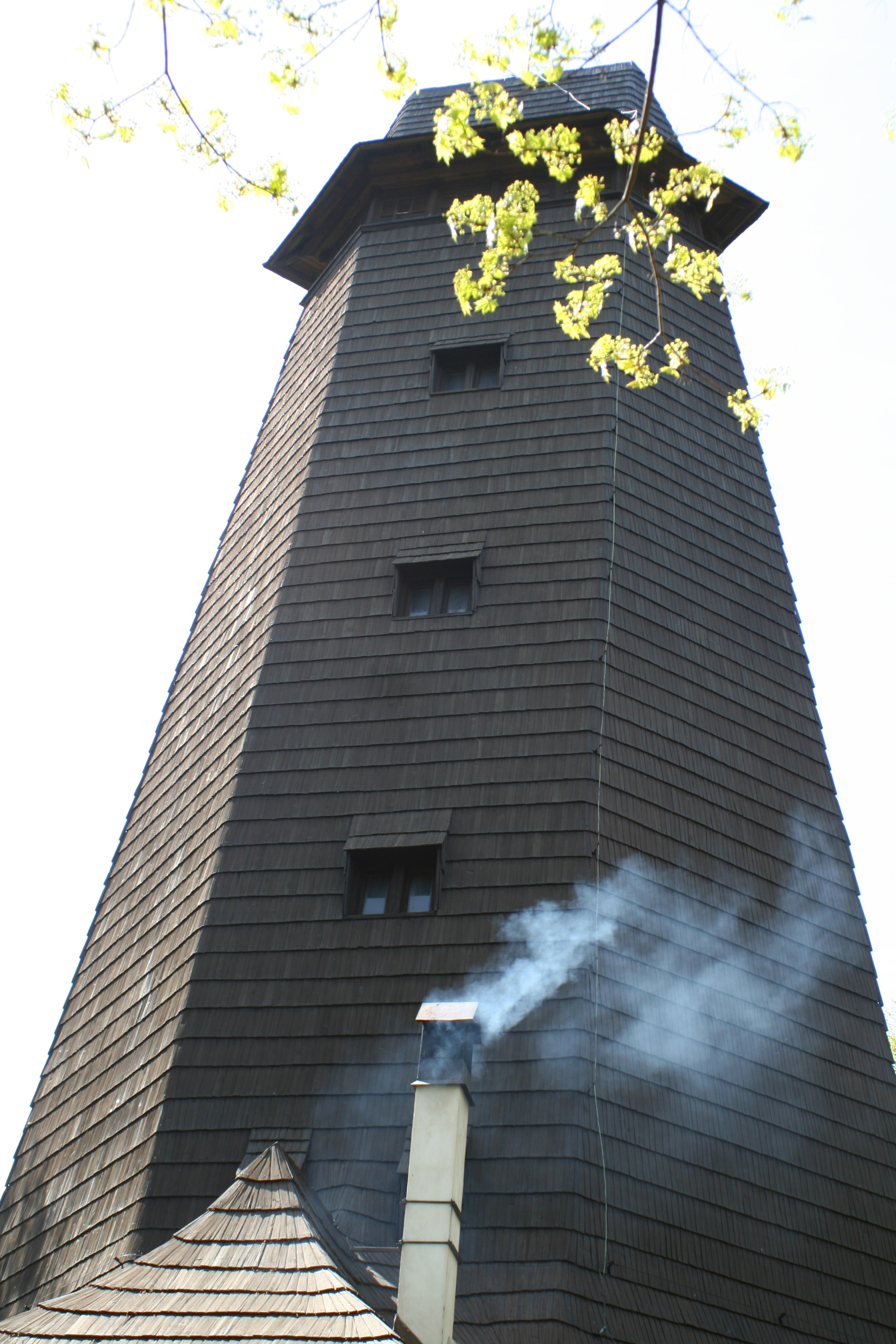 Rozhledna na Blaníku